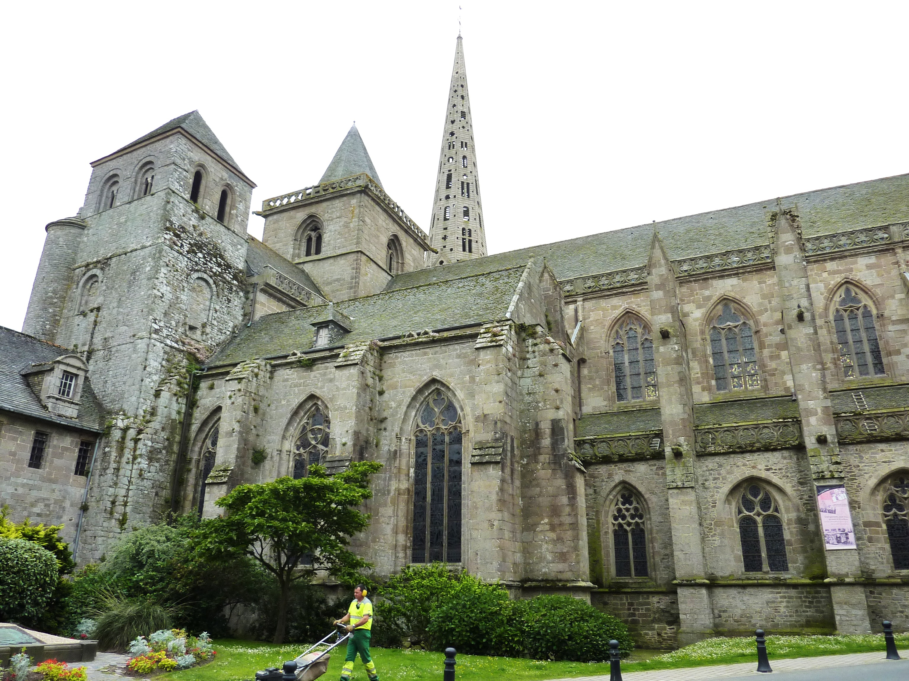 Tréguier: la cathédrale Saint-Tugdual. De gauche à droite: les tours Hastings, du Sanctus et des cloches sur le transept. La chapelle de Jean V, le collatéral nord et la nef.